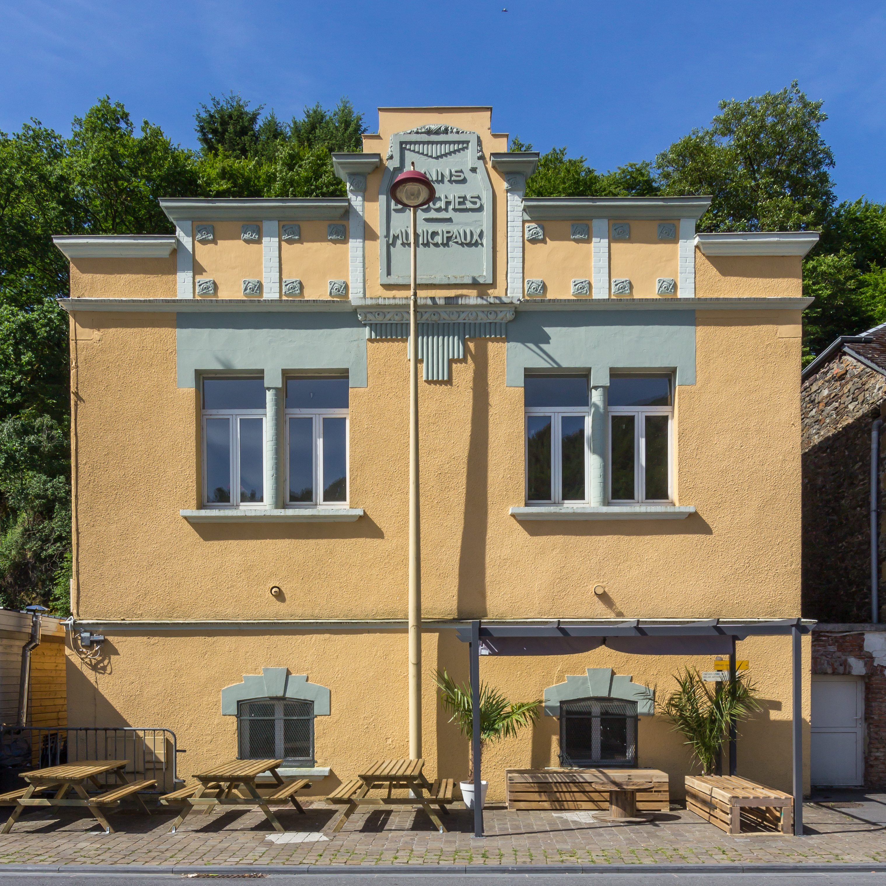 Anciens bains-douches municipaux, Quai Aristide Briand, Monthermé, Champagne-Ardenne This image was uploaded as part of L'Été des villes 2015.